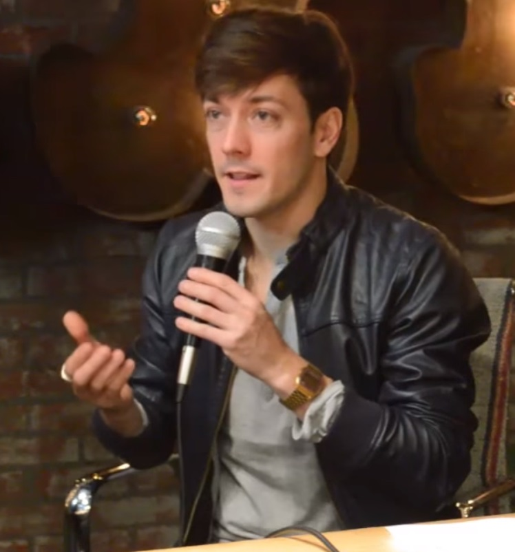 Huella Lince se coló a las cabinas de EXA 104.9 y entrevistamos a Roger Gonzalez, locutor por las tardes, Colate por las noches, y hace algunos años el conductor de uno de los proyectos de la televisión infantil de Disney más ambiciosos: Zapping Zone.